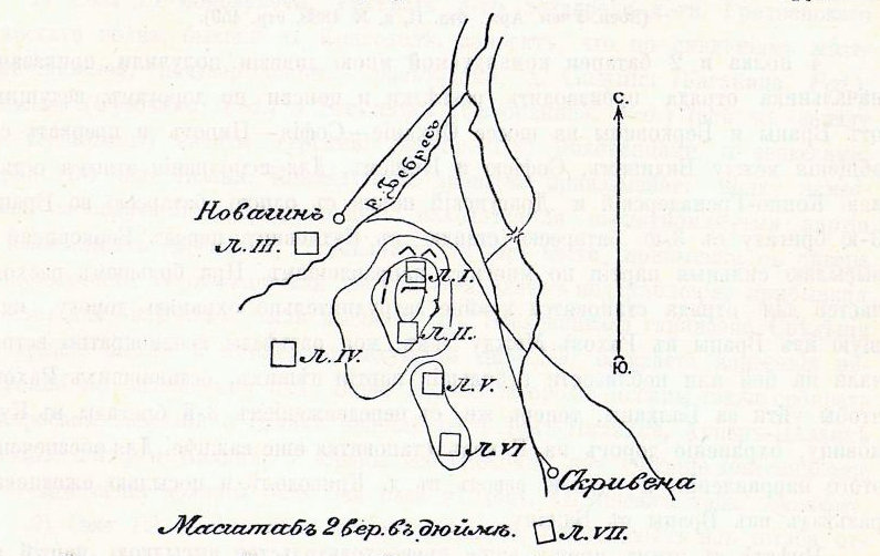 Карта на ложементите при Новачене от 10 ноември 1877 г.